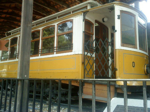 Tranvía en el museo del STE-DF. El Tranvía es el llamado Tranvía Cerito, que operó en la línea Huipulco-Tlalpan junto con los Trenes Ligeros Moyada. Dejo de dar servicio en 1990 con el cierre de la línea.